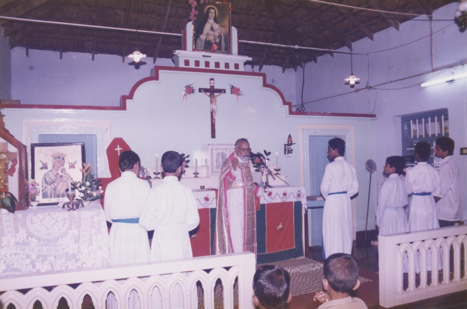 Syro-Malankarische Messe, Kerala, Indien, 1998